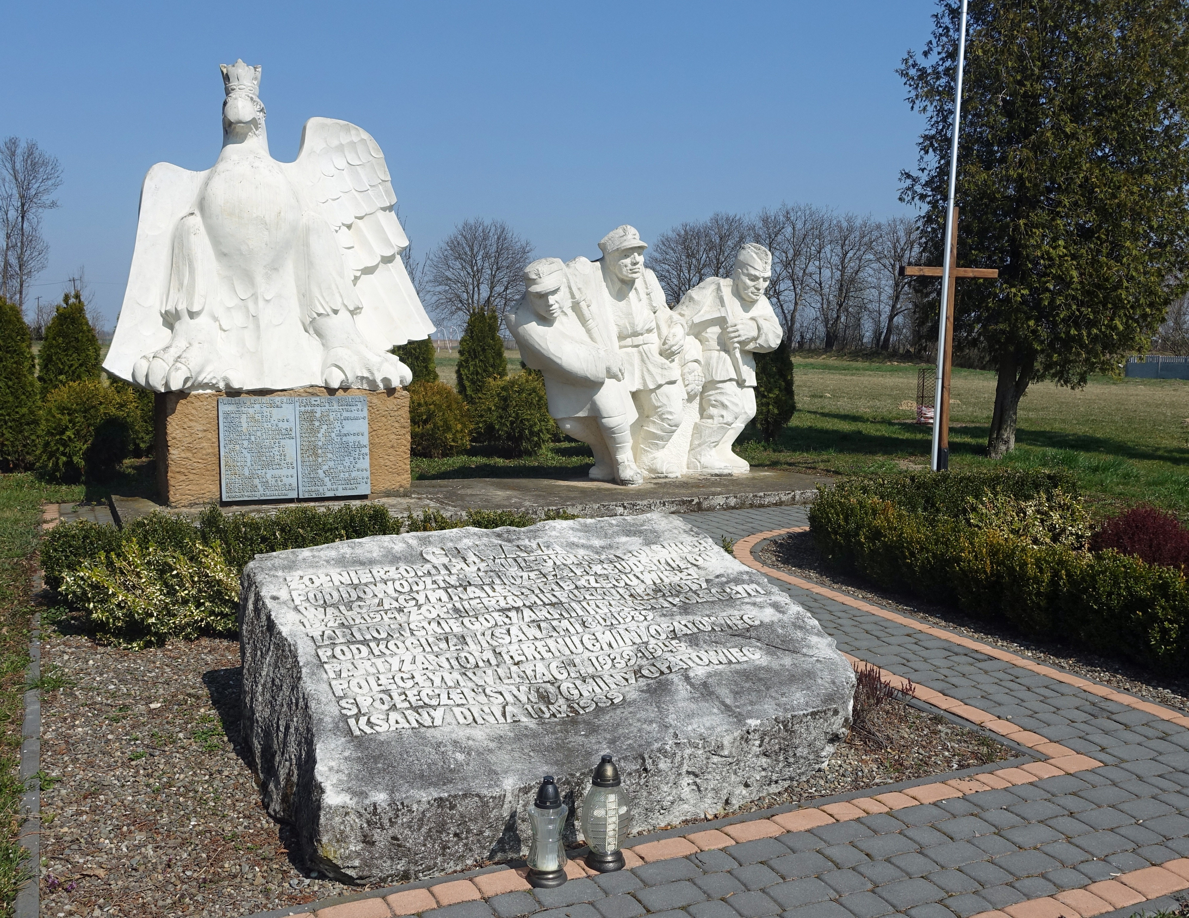 Winicjusz Stoksik – Pomnik Legionisty w Ksanach koło Opatowca (1989)